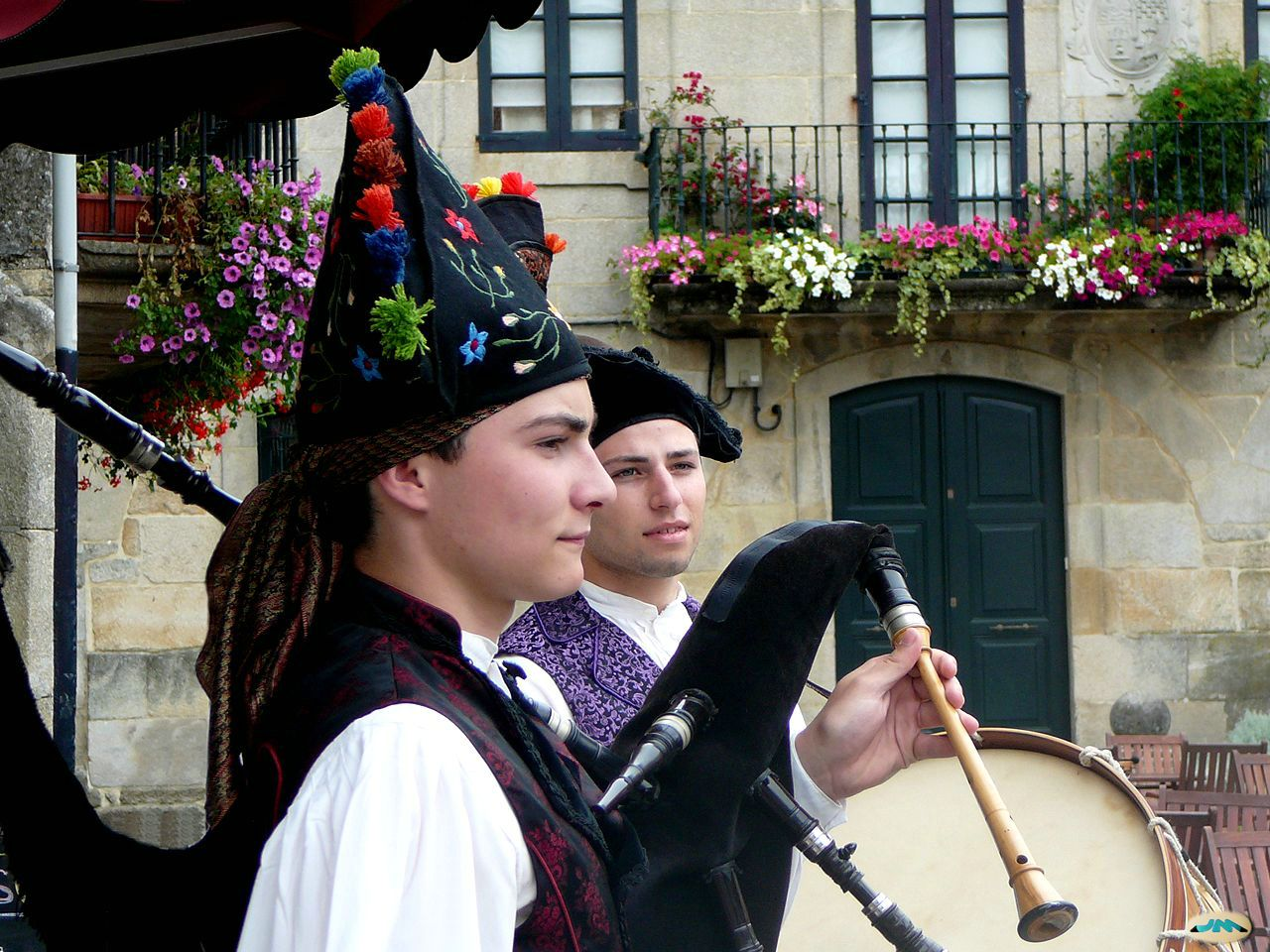 Galician bagpipers